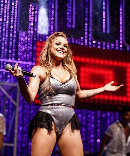 Português do Brasil: Fantine Thó no Chá Rouge em 2018.